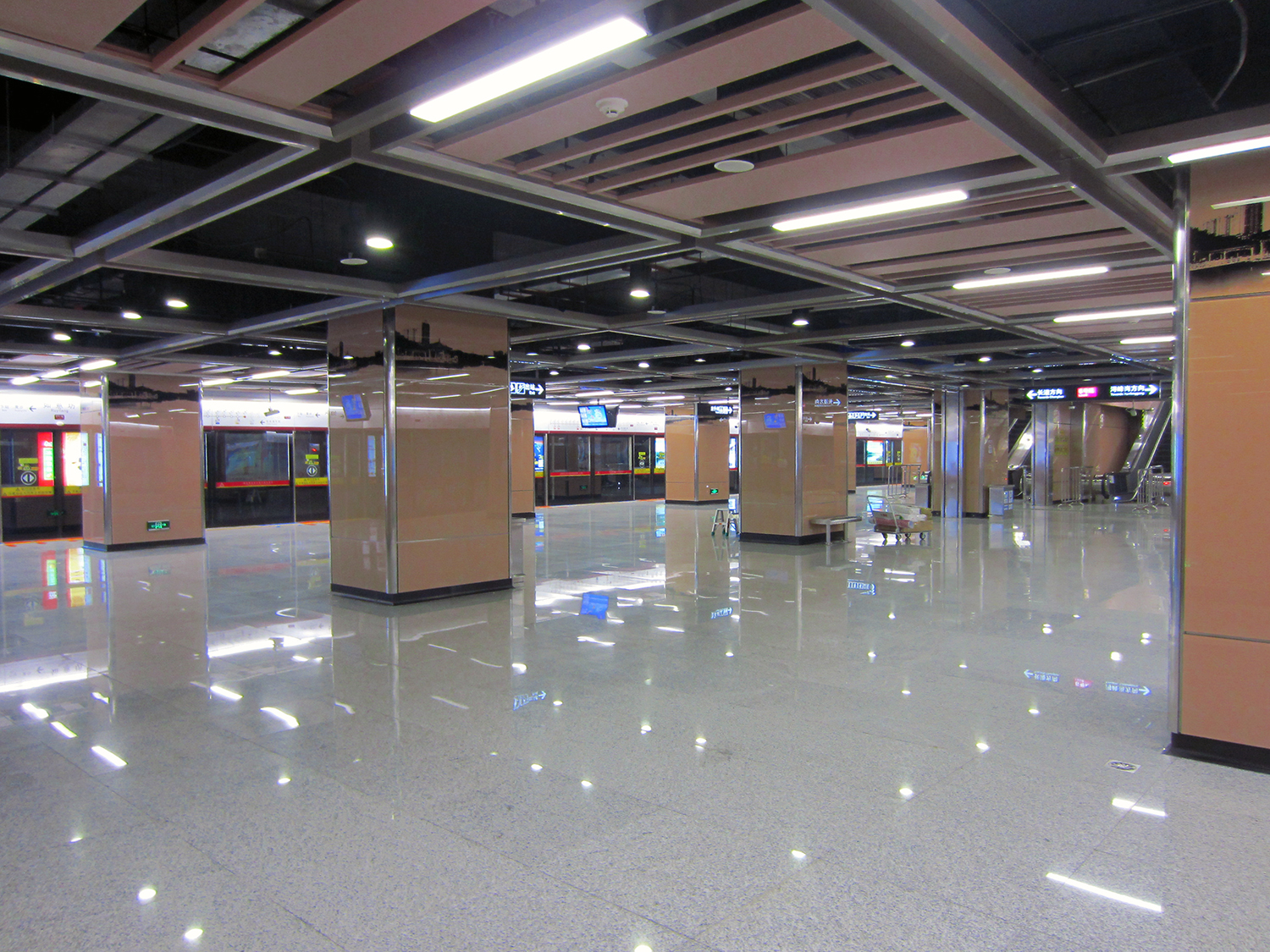 粵語: 如意坊站站台